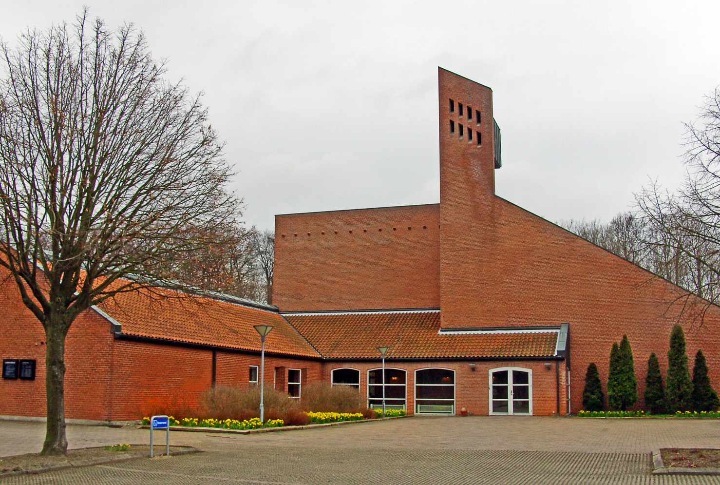 nord for Nykøbing Falster